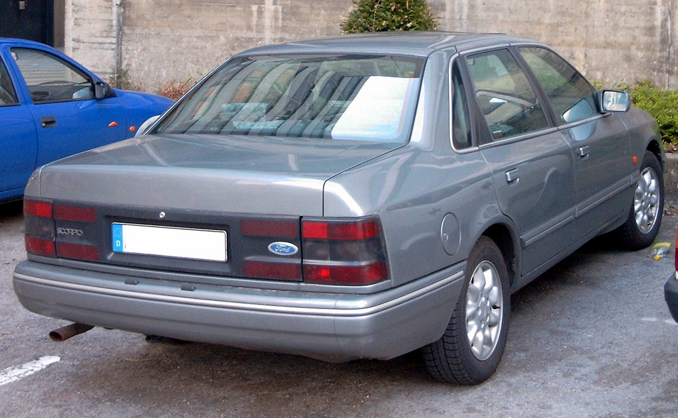 Ford Scorpio'92, Sondermodell Topas (Stufenheck)